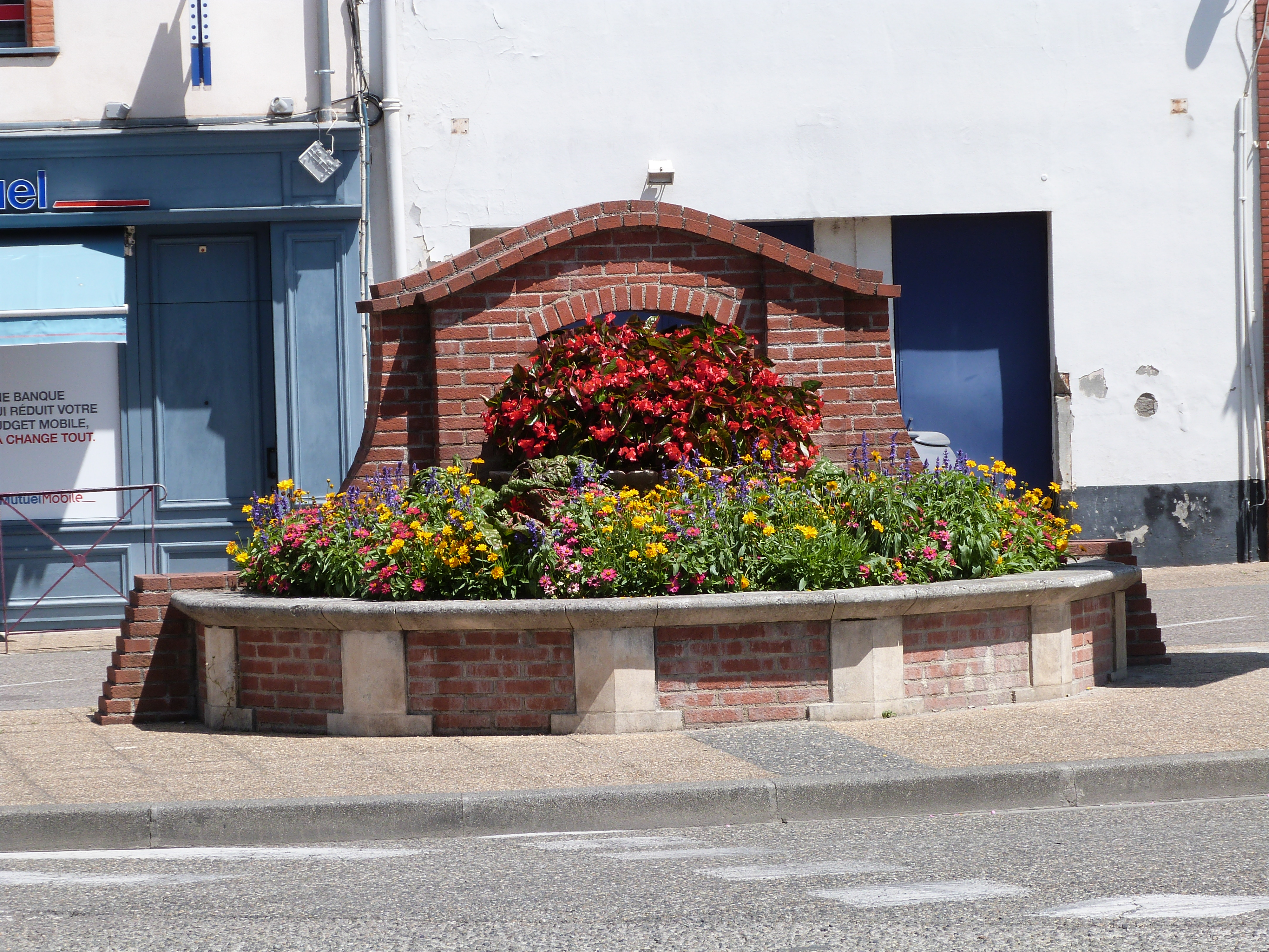 La fontaine située place de Belges à Castelsarrasin (Tarn-et-Garonne)